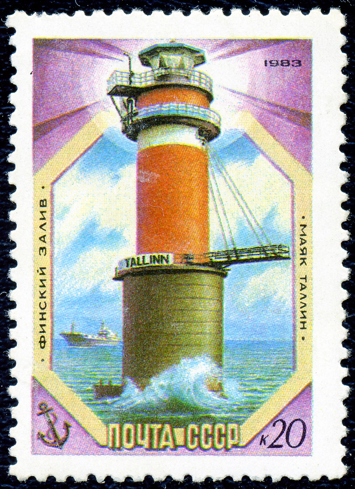 Почтовая марка СССР. 1983. Финский залив. Маяк Таллин